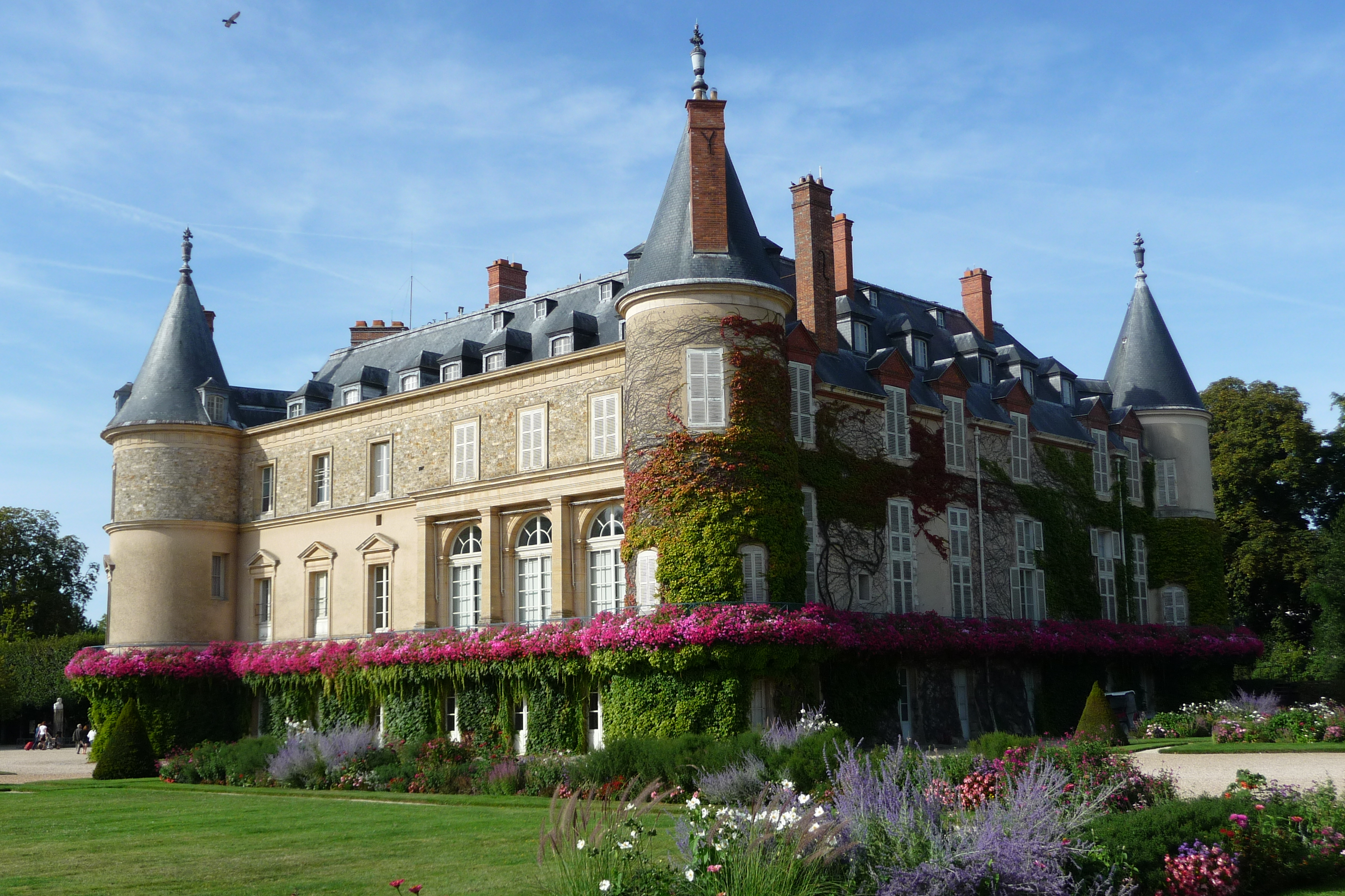 Château de Rambouillet (InscritClassé)